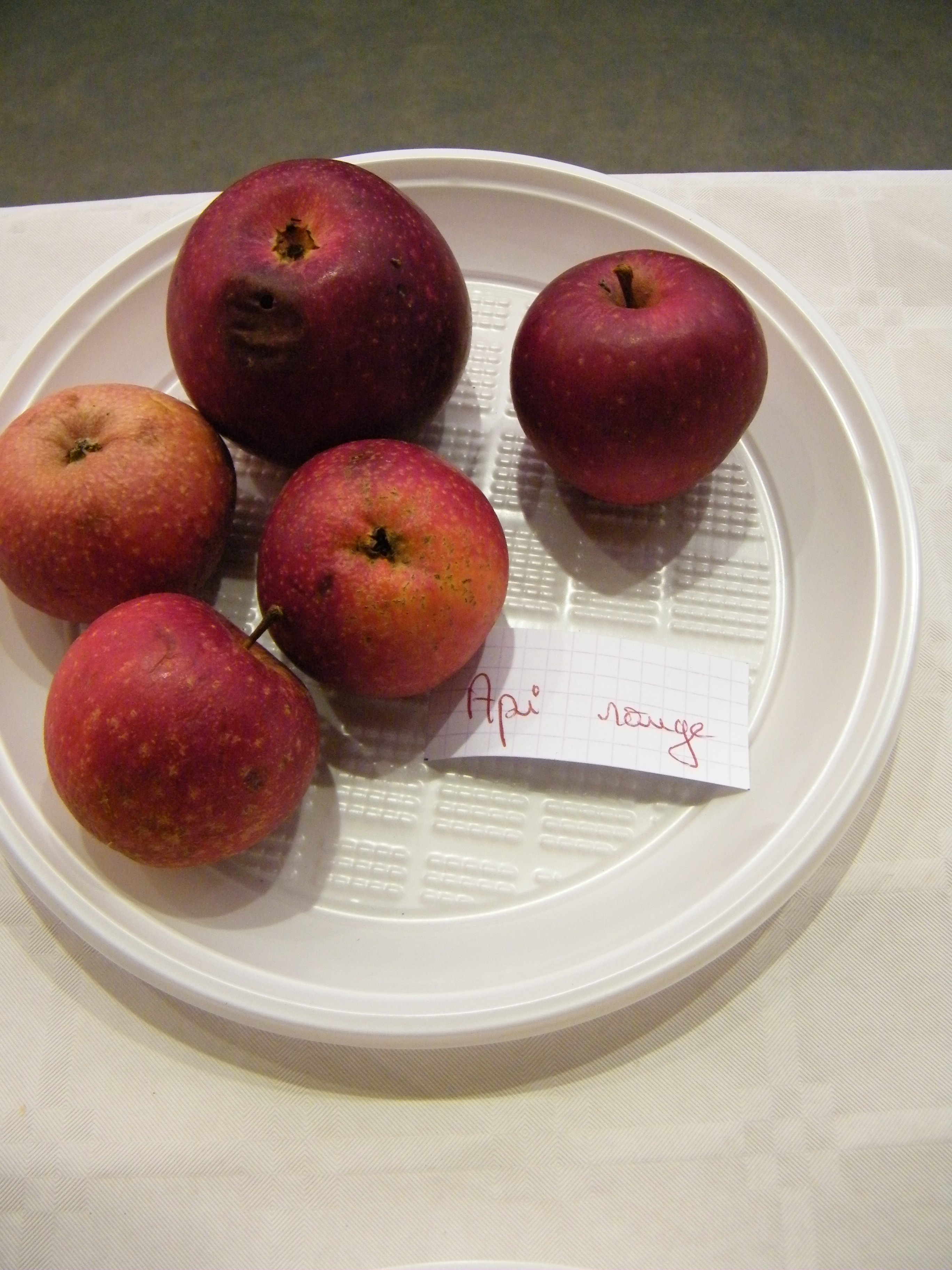 Ailly-le-Haut-Clocher, Somme, Fr,Apple festival 03et04-11-2018 (94)